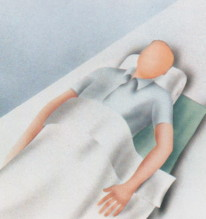 Liegehaltung des Autognenen Trainings